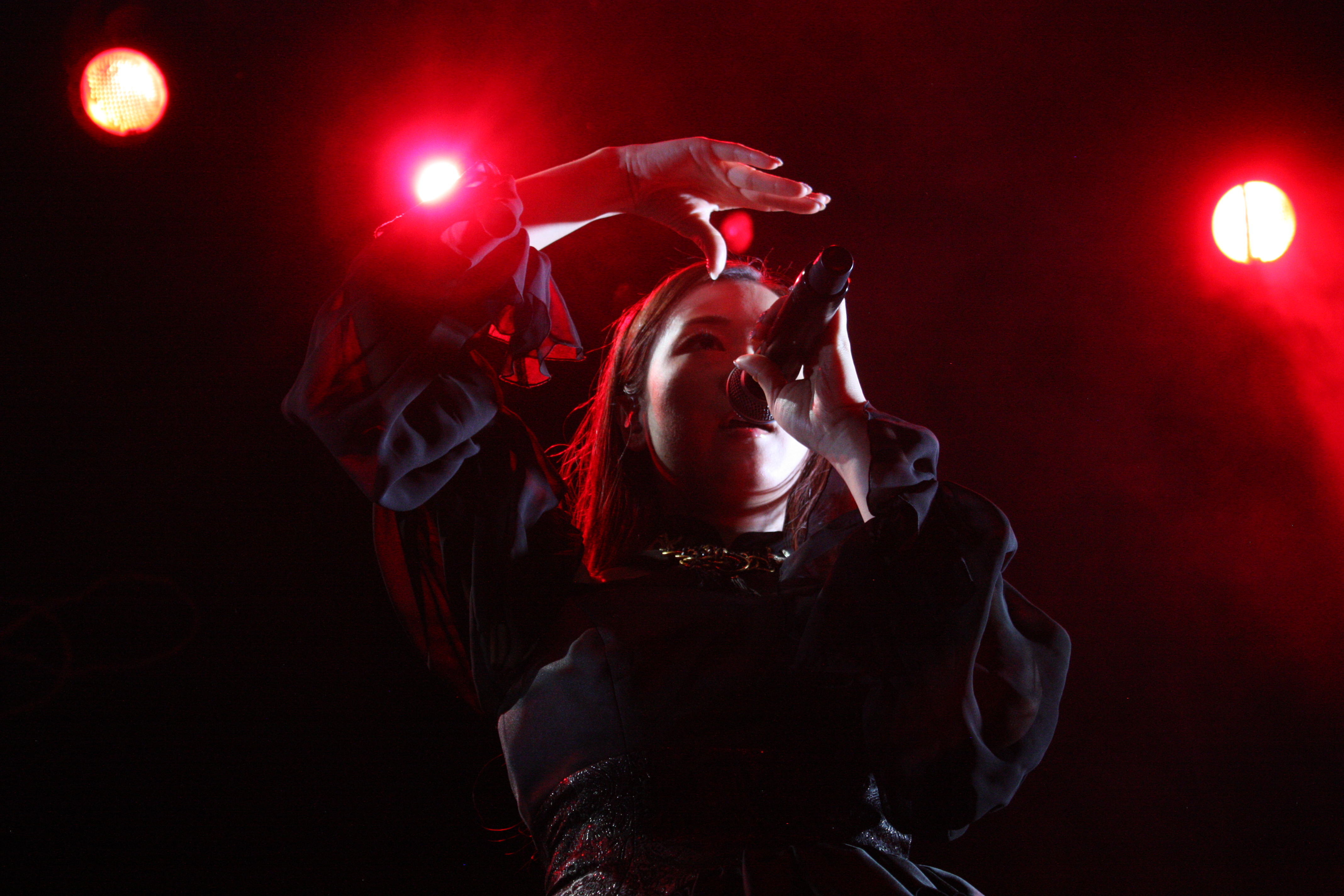 El grupo japonés Kalafina integrado por Hikaru, Keiko y Wakana, presentándose en el Plaza Condesa de la Ciudad de México el pasado 20 de Febrero.